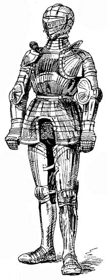 Maximilian Armour of Kurfurst Otto Heinrich, Pfalzgraf bei Rhein